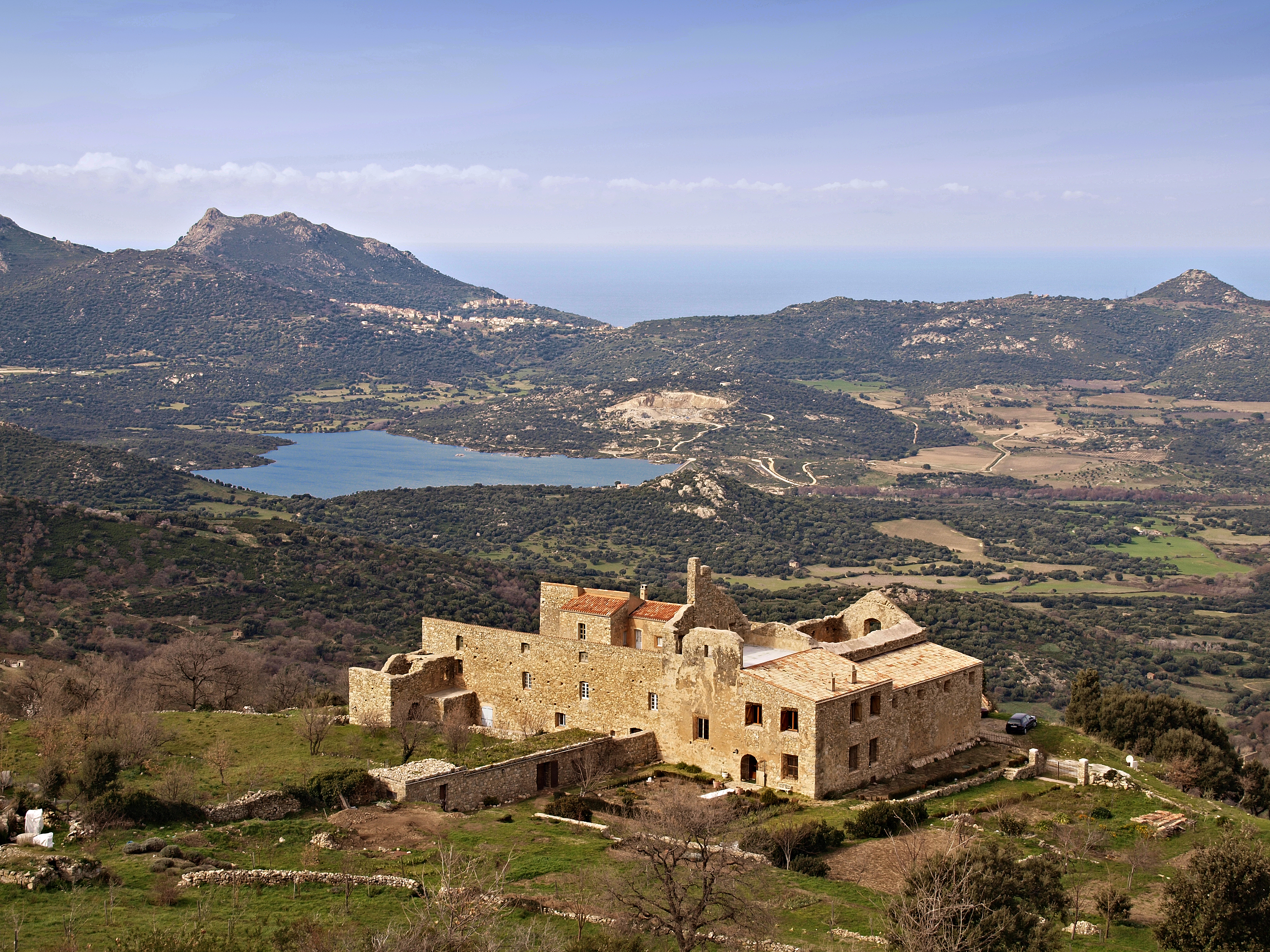 Speloncato (Corsica) - Ancien couvent et barrage de Codole